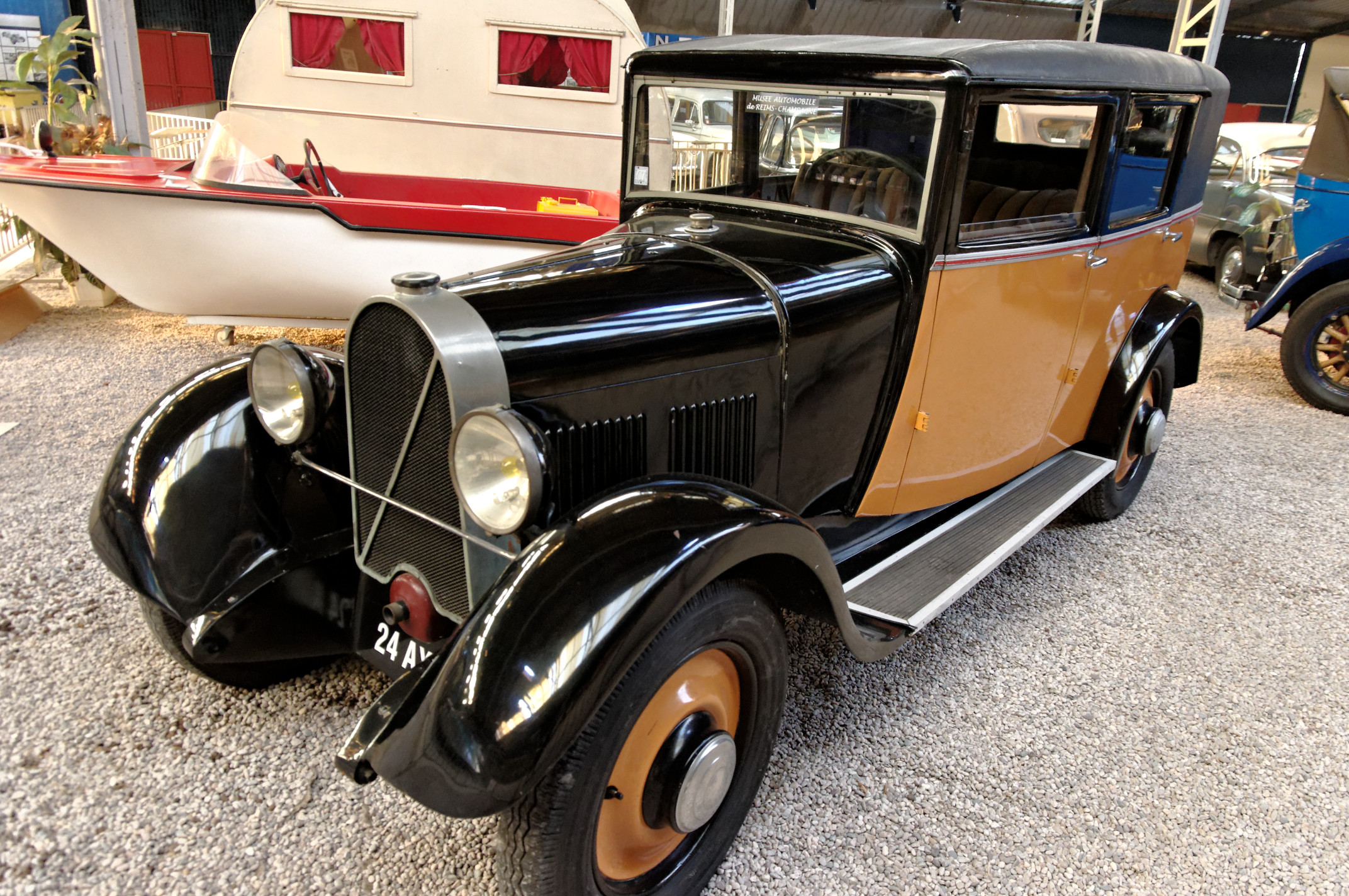 Michel Irat CB 2 (1930), Berline semi Weymann, 4 cyl., moteur culbuté, 1086 cm3, 7 cv fiscaux, vitesse max. 95 km/h (Musée Automobile Reims Champagne, Reims, Marne, France)